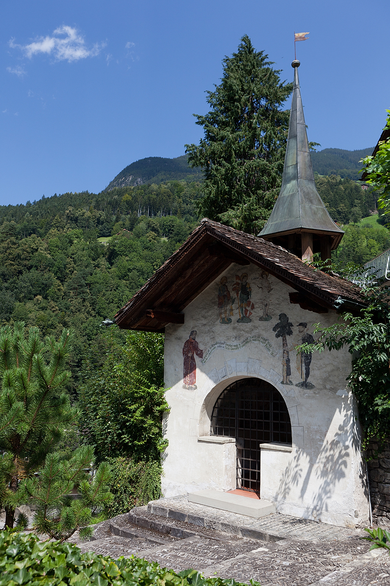 Tellskappelle in Bürglen (UR)